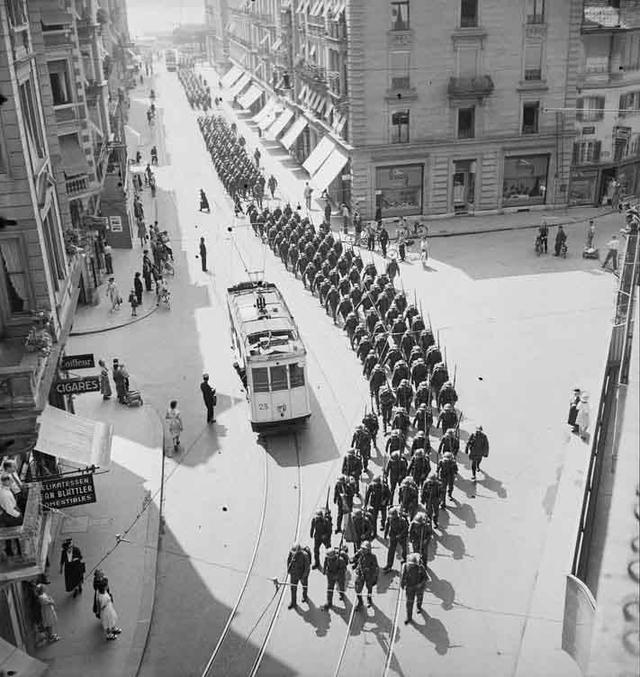 Soldatenkolonne Marsch Alpenstrasse (Luzern), Fahnen Weggisgasse (Luzern), Armee, Militär, 2. Weltkrieg Signatur StALU: 1943.08 FDC 76/991 R340: Soldaten marschieren durch Strasse an Tram vorbei 1943.08 FDC 76/991.1